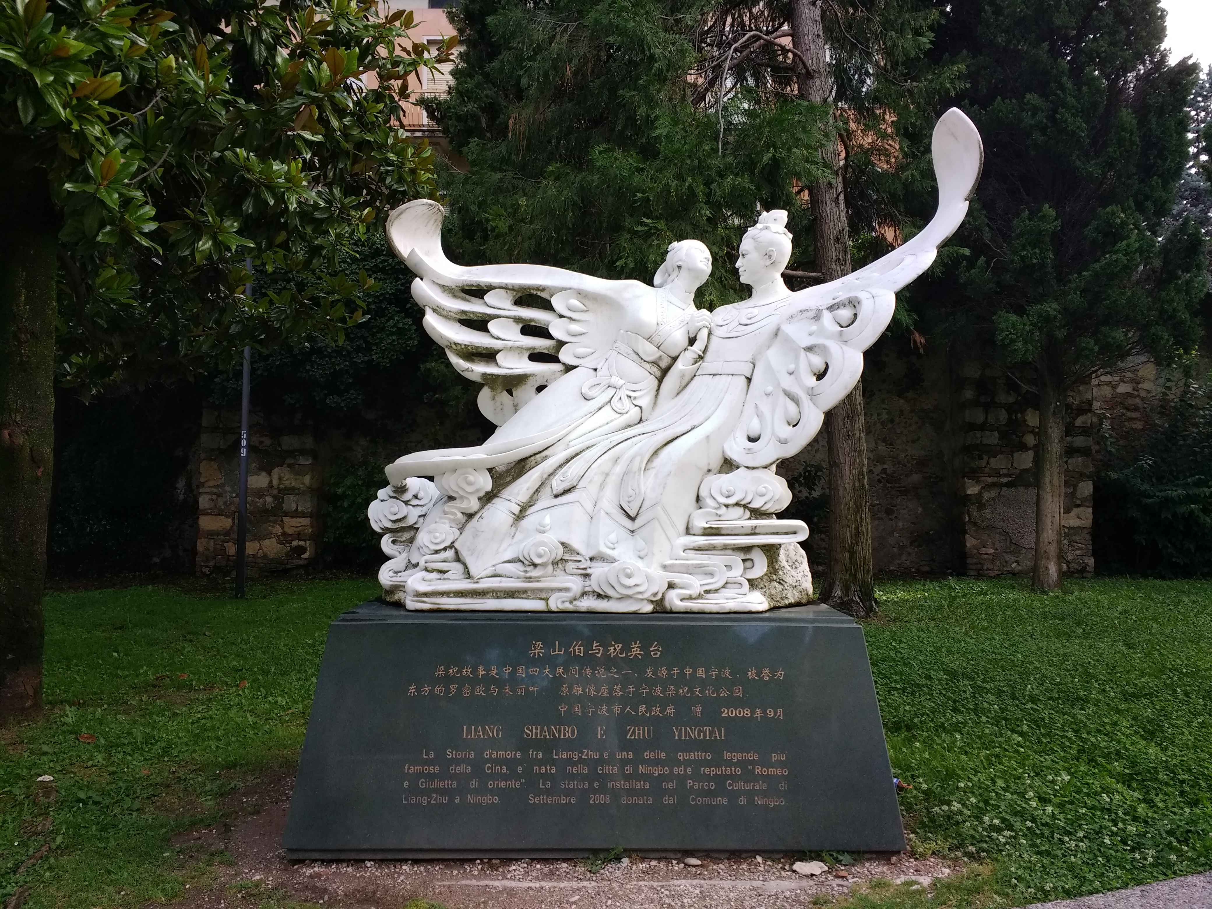 Monumento al Liang Shanbo kaj Zhu Yingtai en Verono, Italio